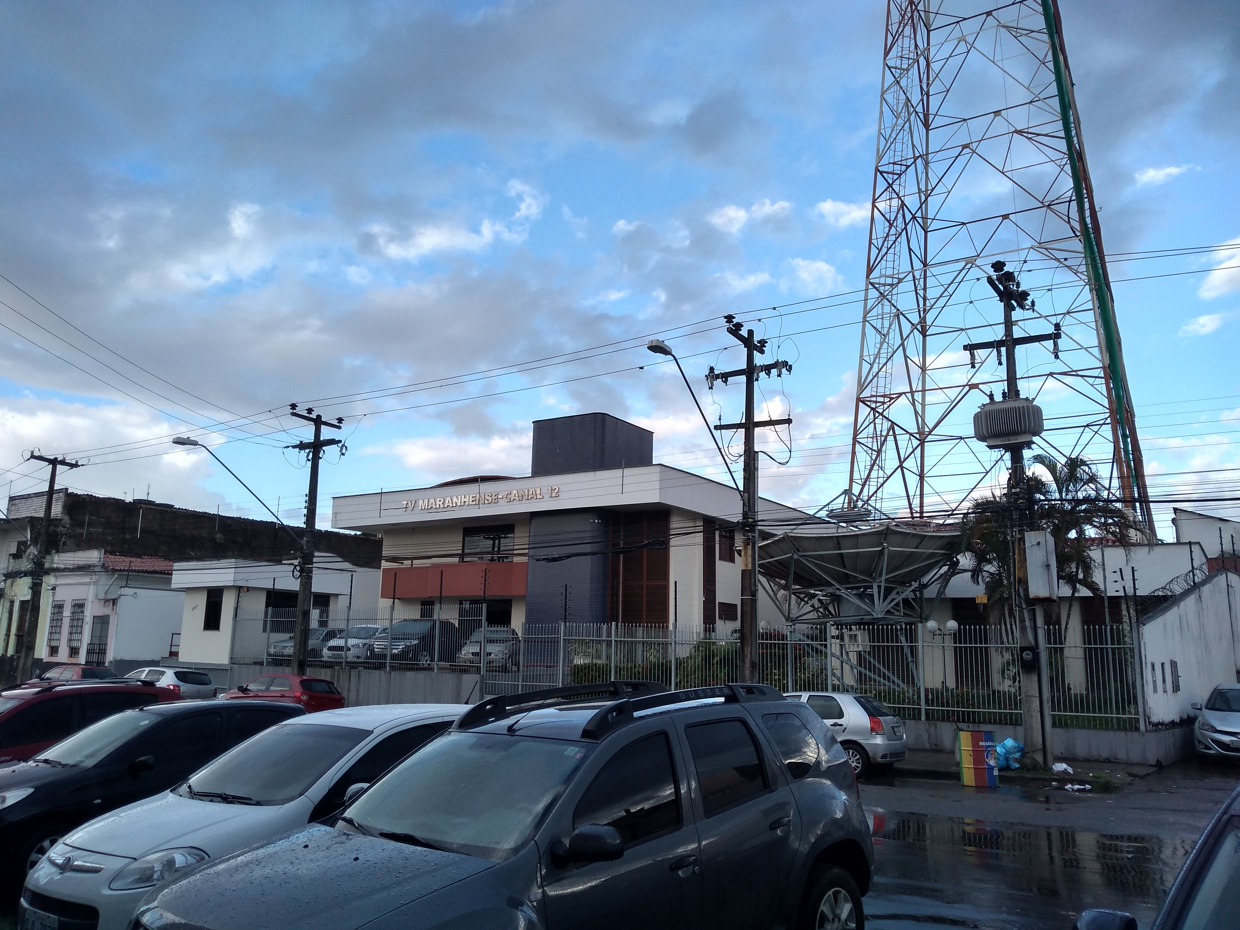 Sede da TV Maranhense, emissora de televisão sediada em São Luís, MA - Brasil